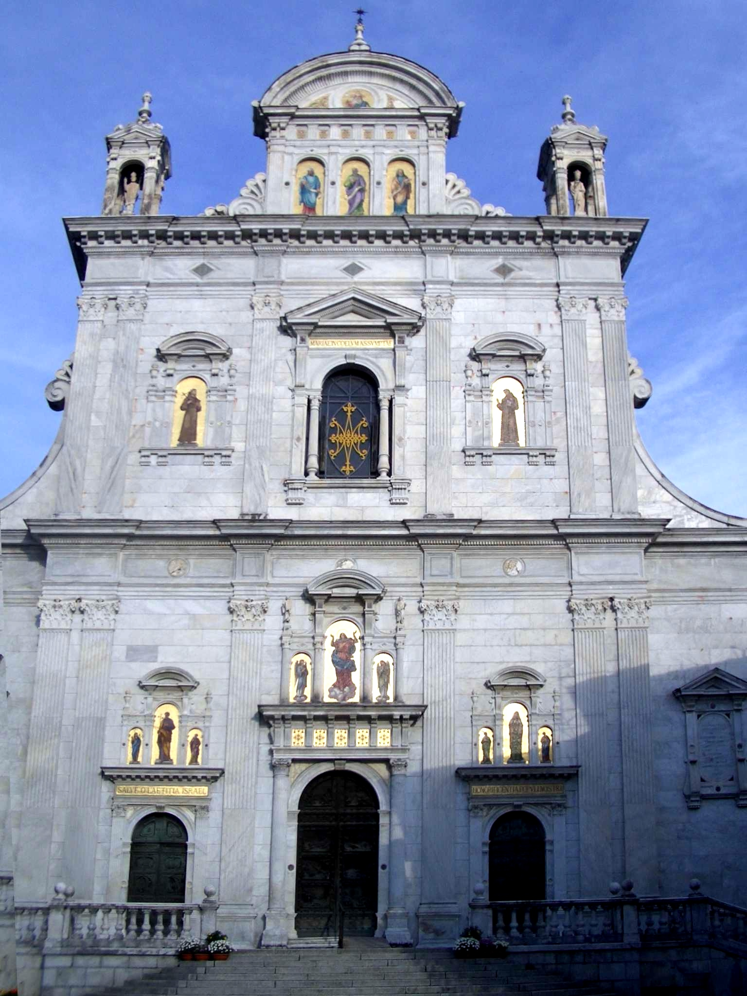 Photo of Basilic church at Sacro Monte di Varallo (XV century), Varallo Sesia (VC), Italy